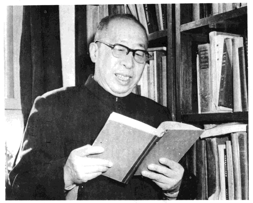 俞大绂1960年代初在書房